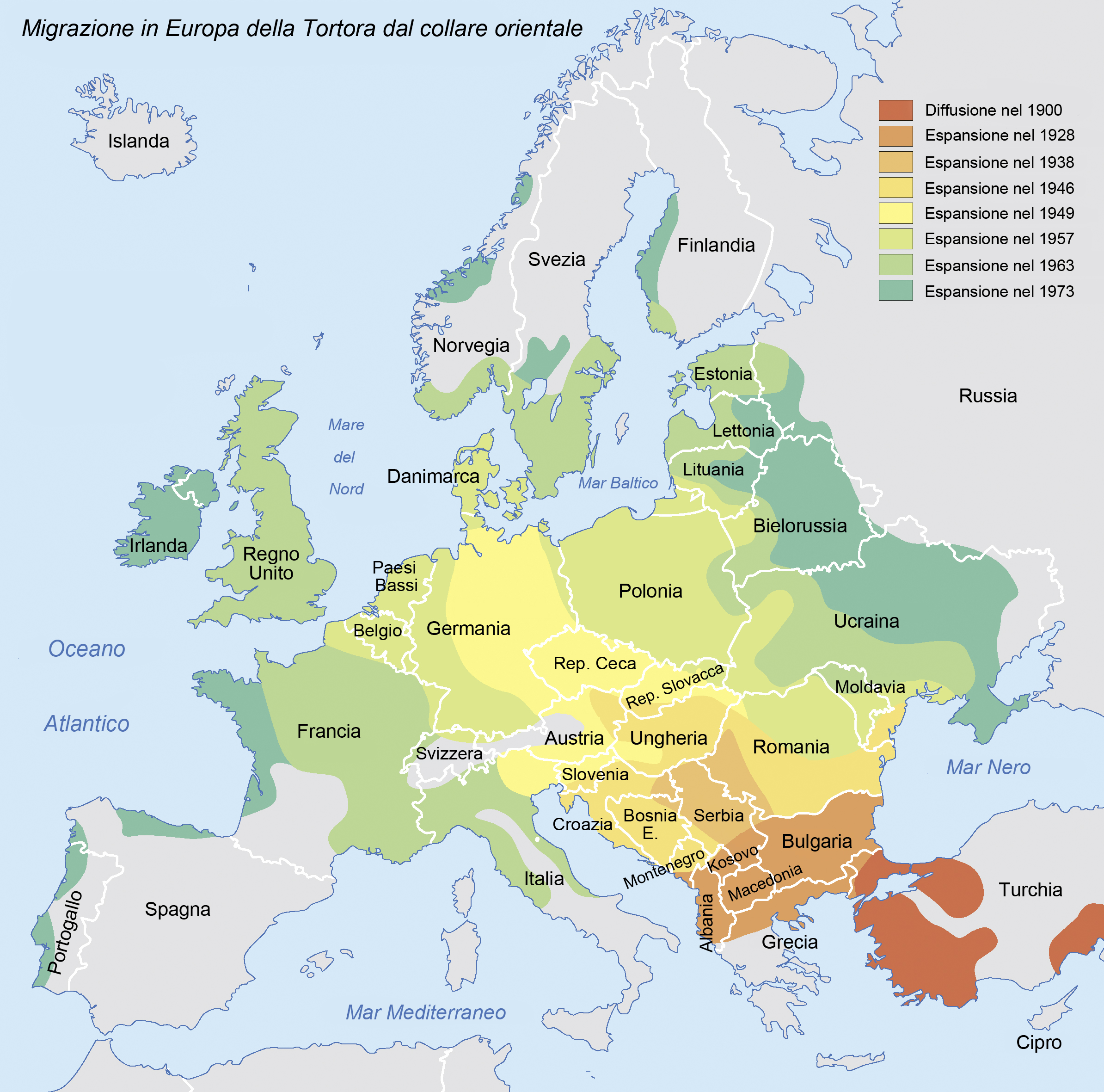 Mappa dell'espansione di Streptopelia decaocto